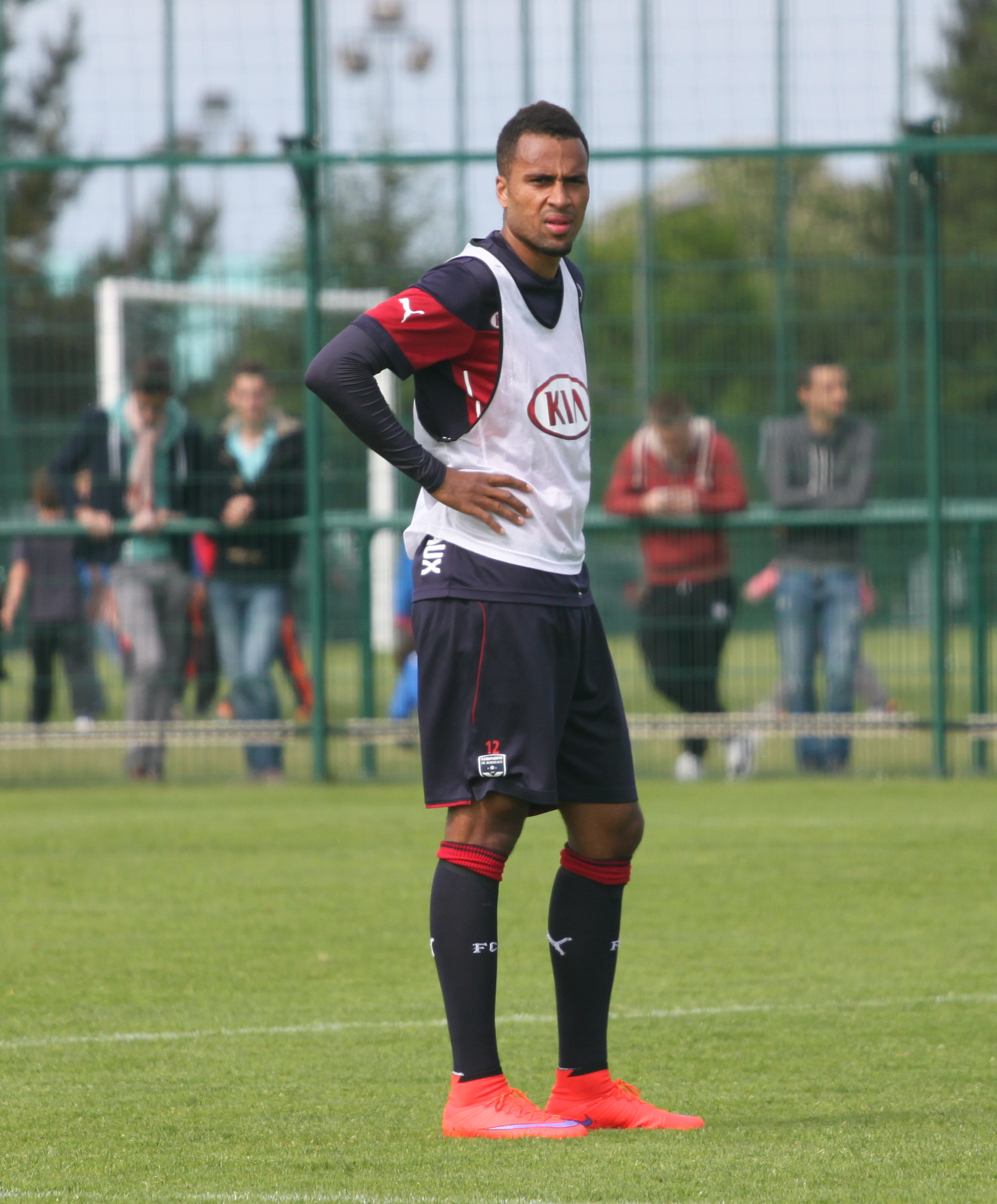 Kiese Thelin à l'entraînement.